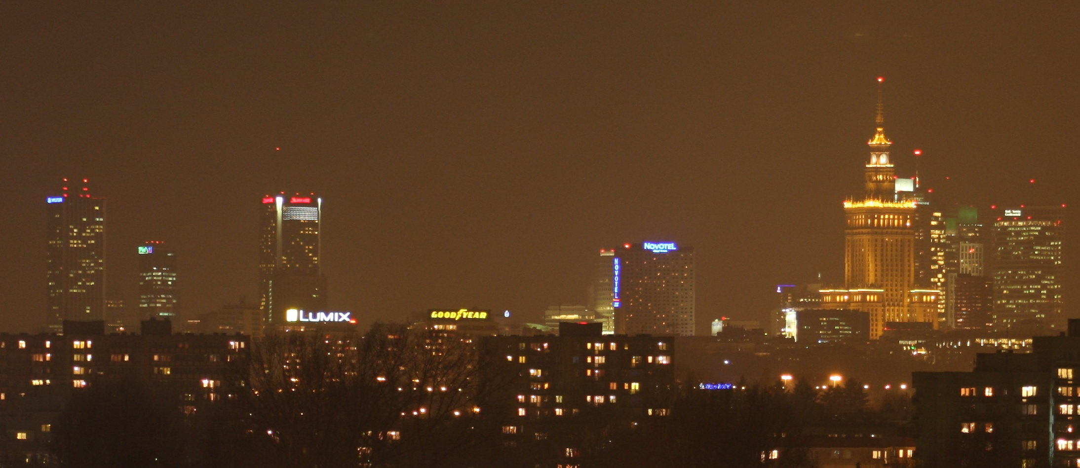 Śródmieście nocą